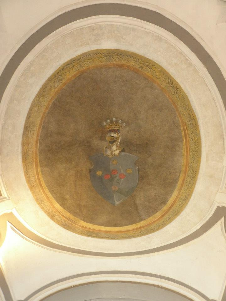 Stemma nell'androne del palazzo Tufarelli.